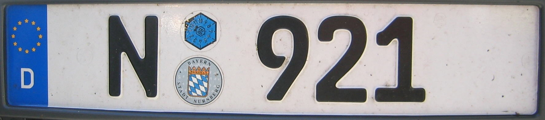 Deutsches KFZ-Kennzeichen Konsularisches Korps, zugelassen in Nürnberg / German registration plate for foreign consul in Nuremberg